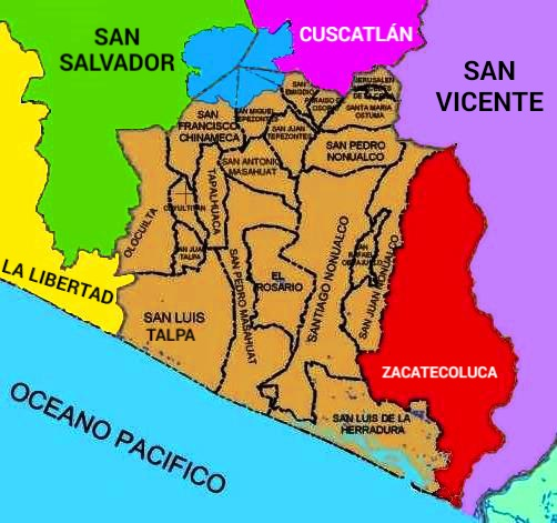 Mapa de Zacatecoluca en el Departamento de La Paz, El Salvador